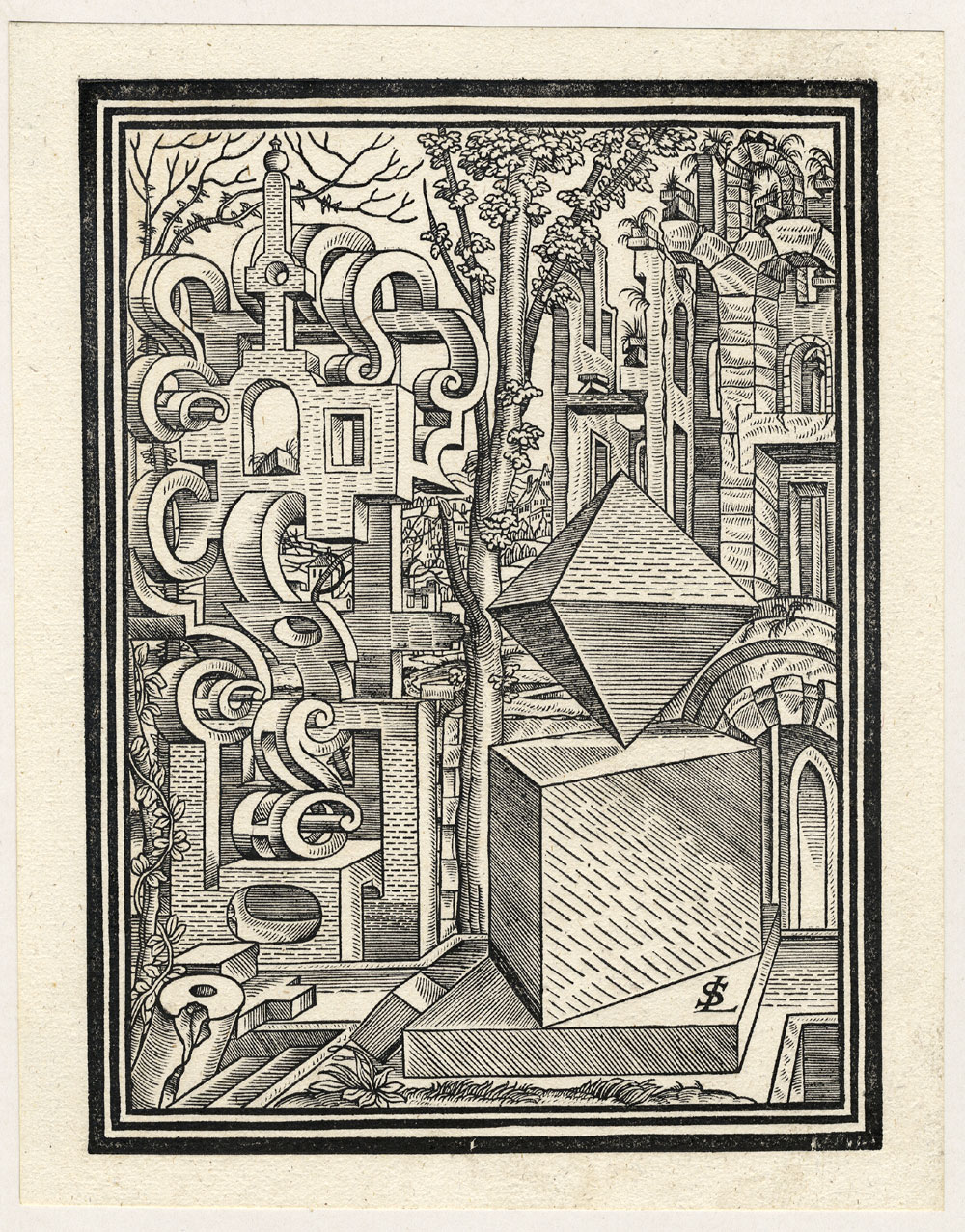 Blatt aus: Hierinn etliche zerbrochne Gebew, den Schreinern in eingelegter Arbait dienstlich, auch vil andern Liebhabern zu sondern gefallen geordnet unnd gestelt. Augsburg, Rogel, 1567